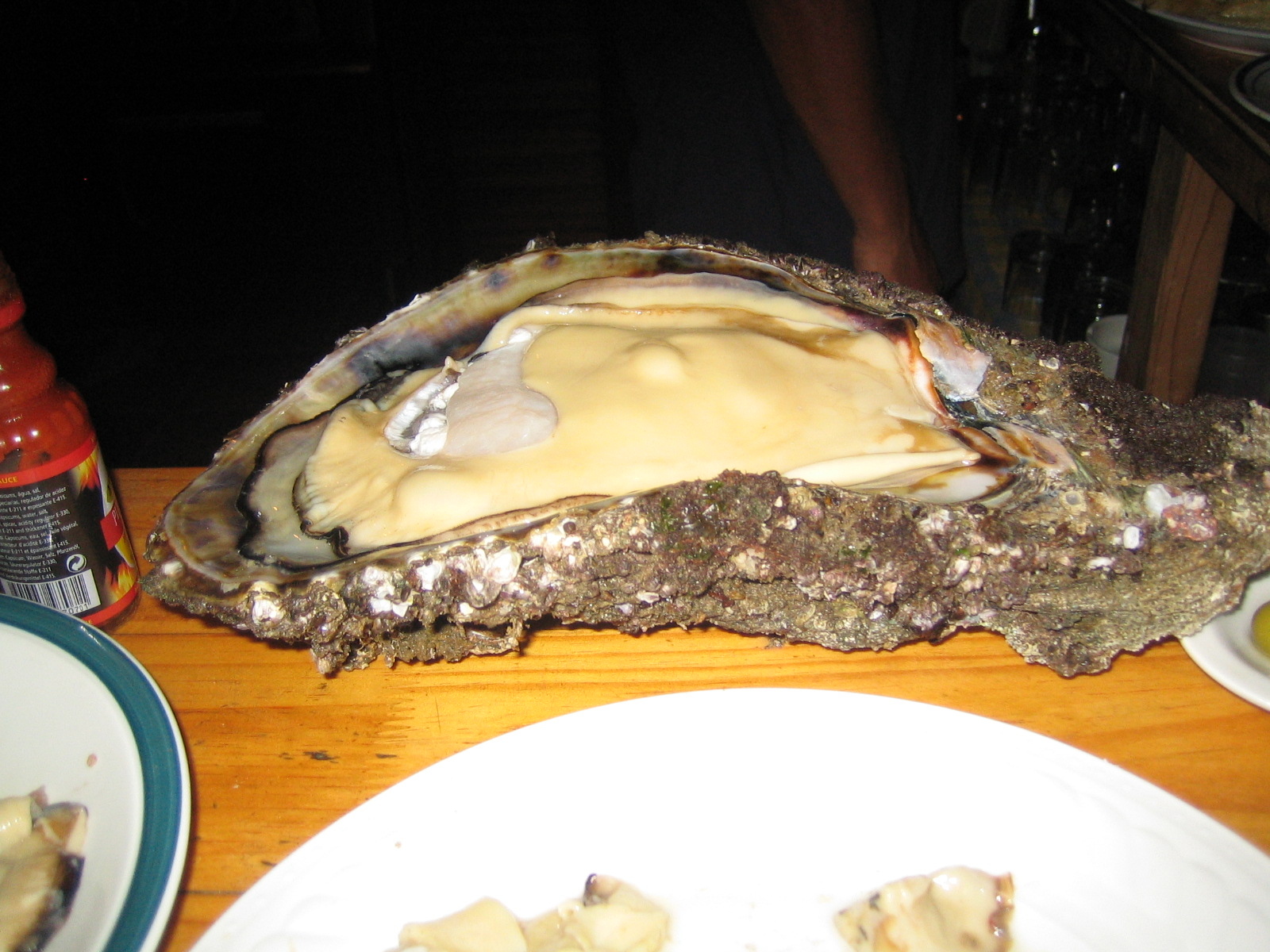 Ostra gigante no sul de Angola. Giant oyster in south Angola.